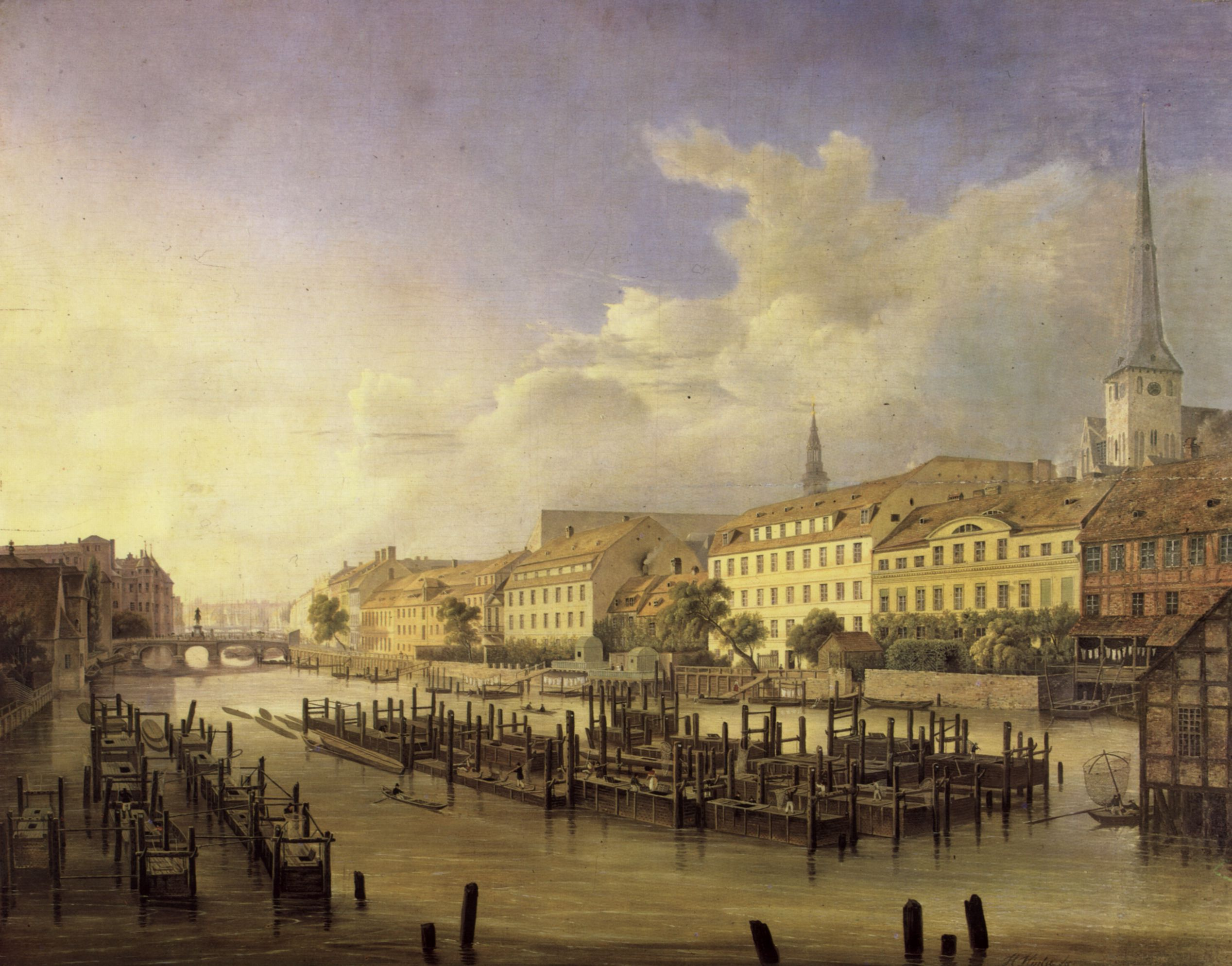 Im Bildhintergrund befindet sich die sog. Lange Brücke von 1694 mit dem Kurfürstendenkmal (die spätere Kurfürstenbrücke (1896–1945) bzw. die heutige Rathausbrücke (seit 1953).)